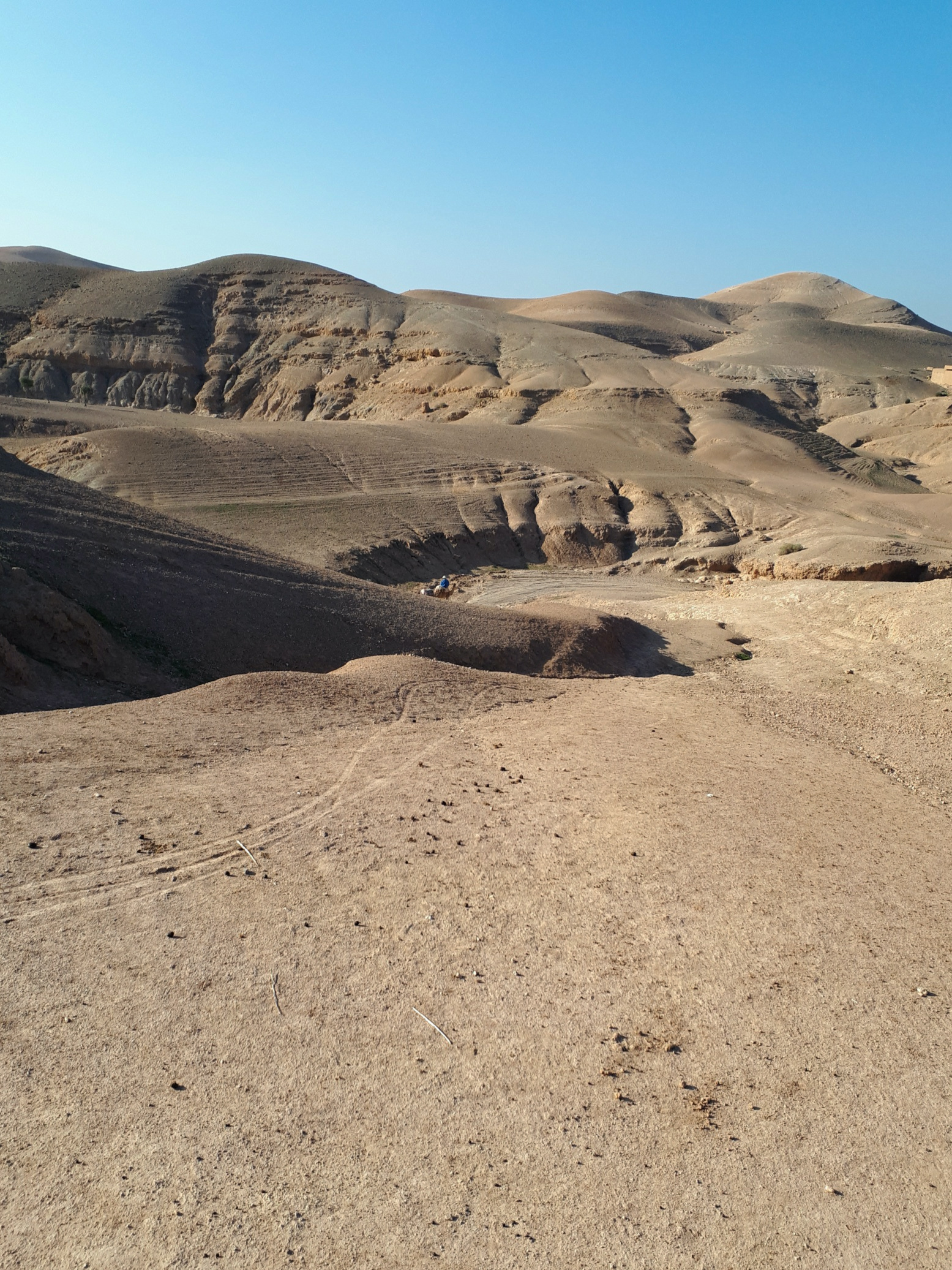 Etendue désertique à une quarantaine de kilomètres de Marrakech